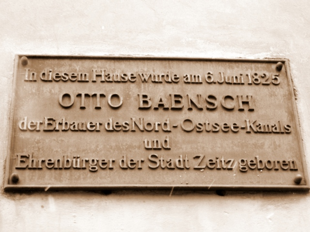 Gedenktafel für Otto Baensch am Haus Rahnestr. 16 Zeitz